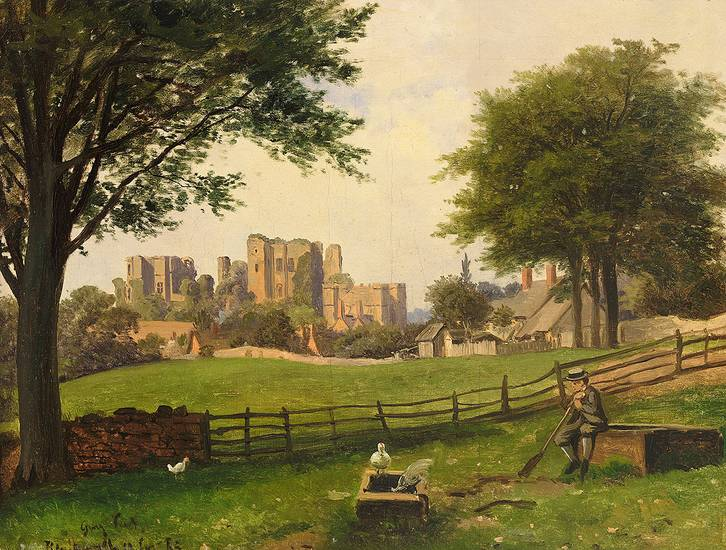 Georg Saal: Kenilworth, (18)65, Öl auf Leinwand, 36,5 x 48 cm